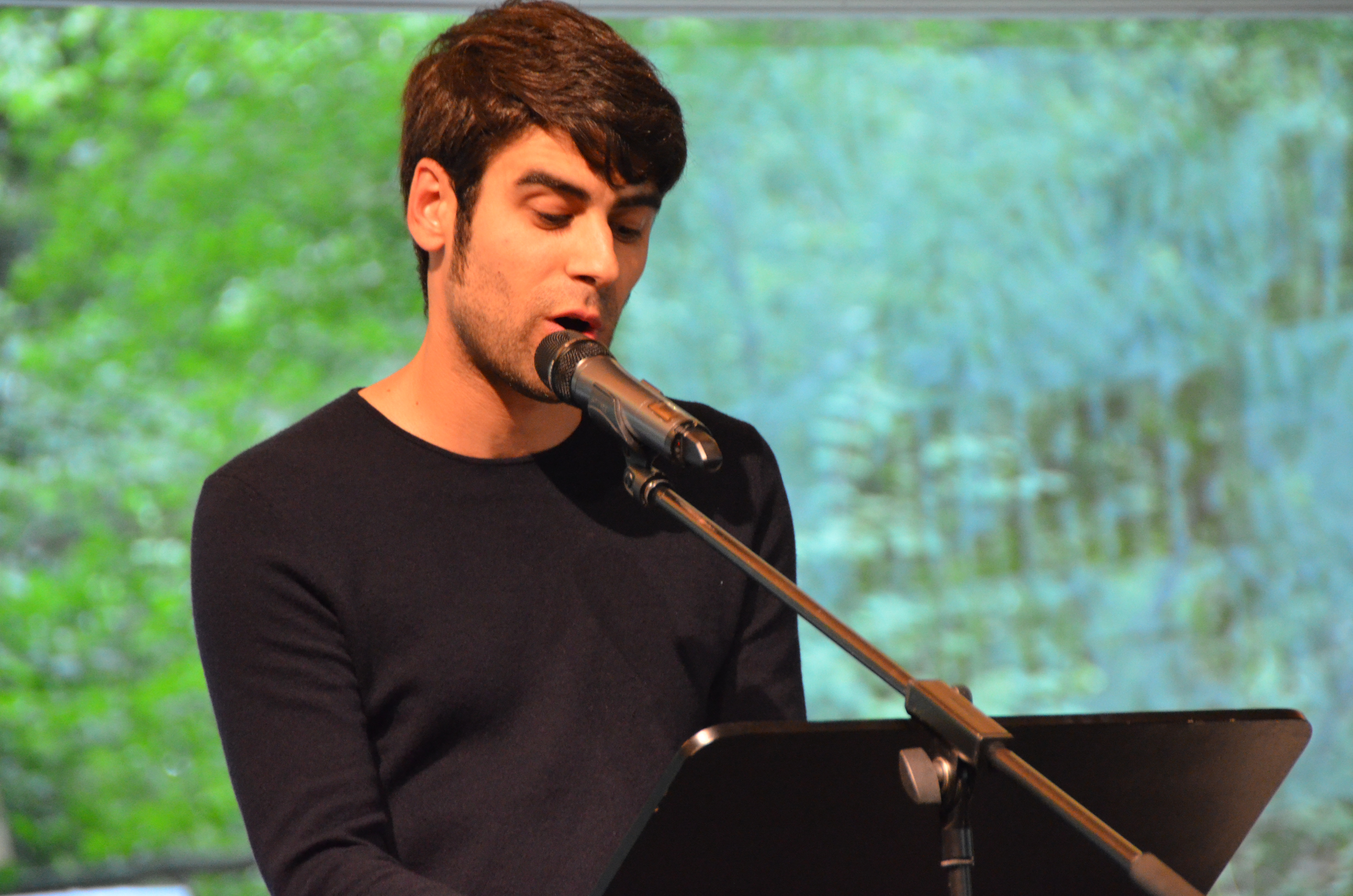 Marius Hulpe liest auf dem Poesiefetival Berlin 2015